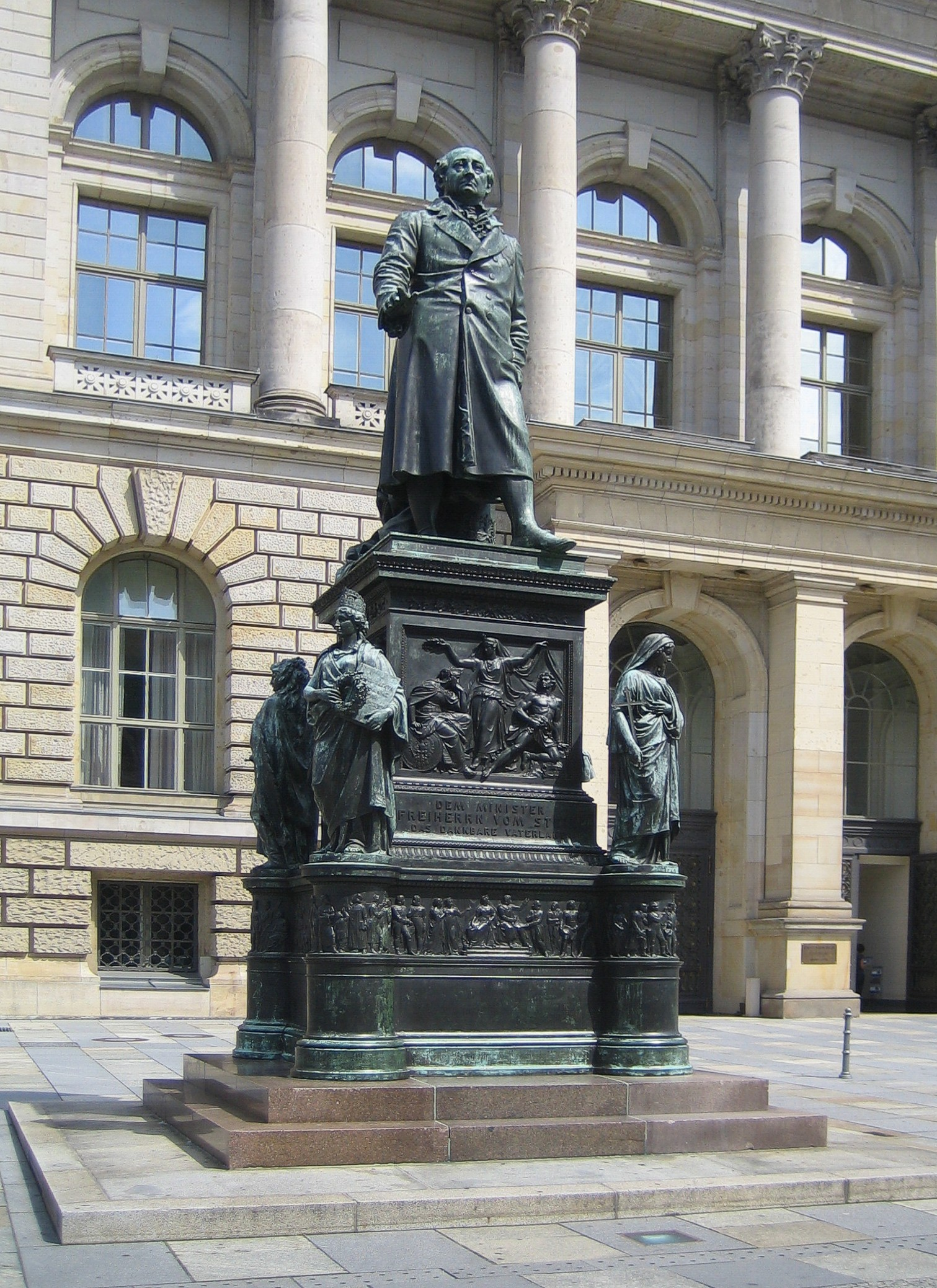 Denkmal für den preußischen Minister Freiherr vom und zum Stein, entstanden 1867. Bildhauer: Hermann Schievelbein. Heutiger Standort: Berlin-Mitte, Niederkirchnerstraße, vor dem Berliner Abgeordnetenhaus. Ursprünglicher Standort: Dönhoffplatz/Leipziger Straße.